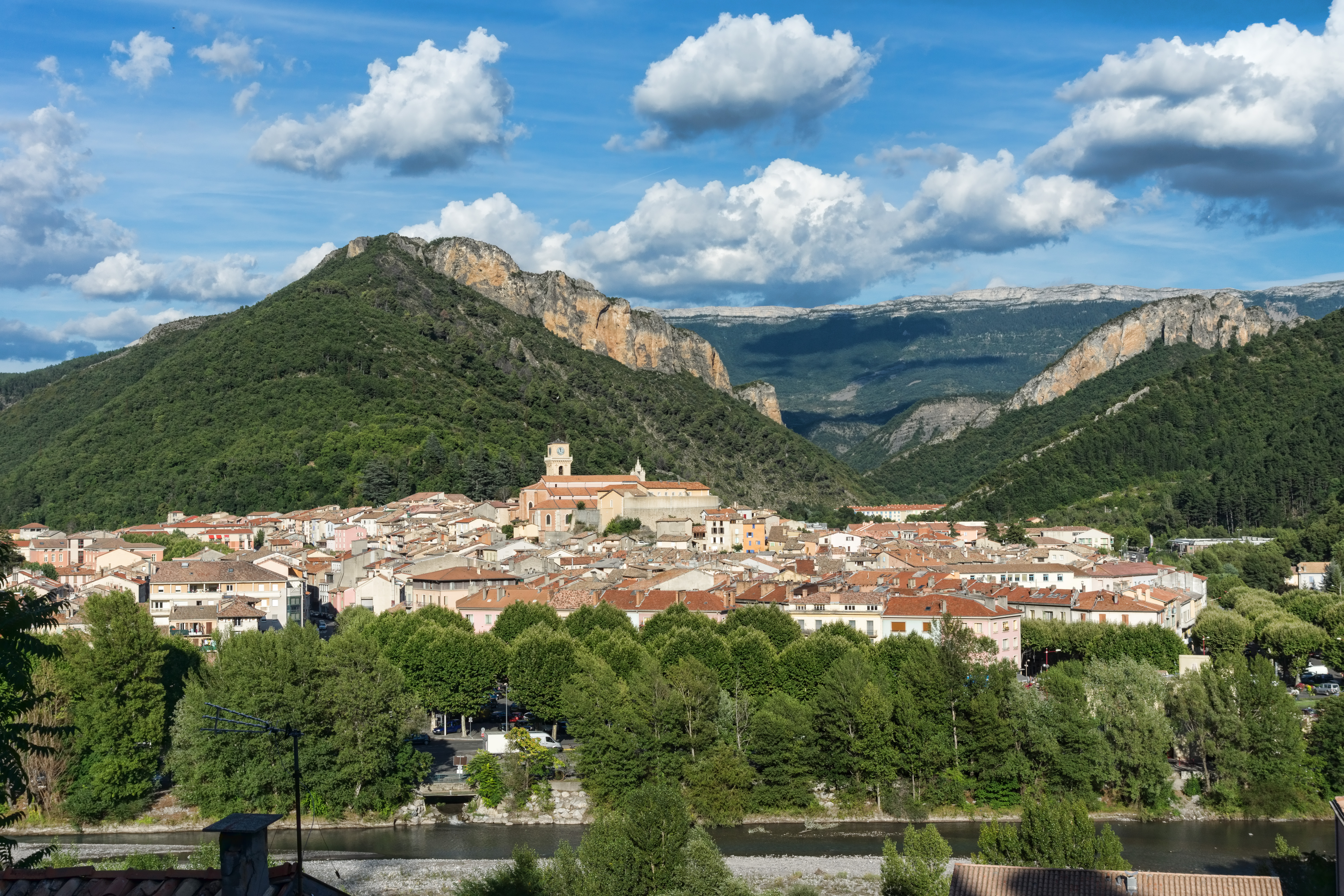 Digne les bains, vue vers l'est